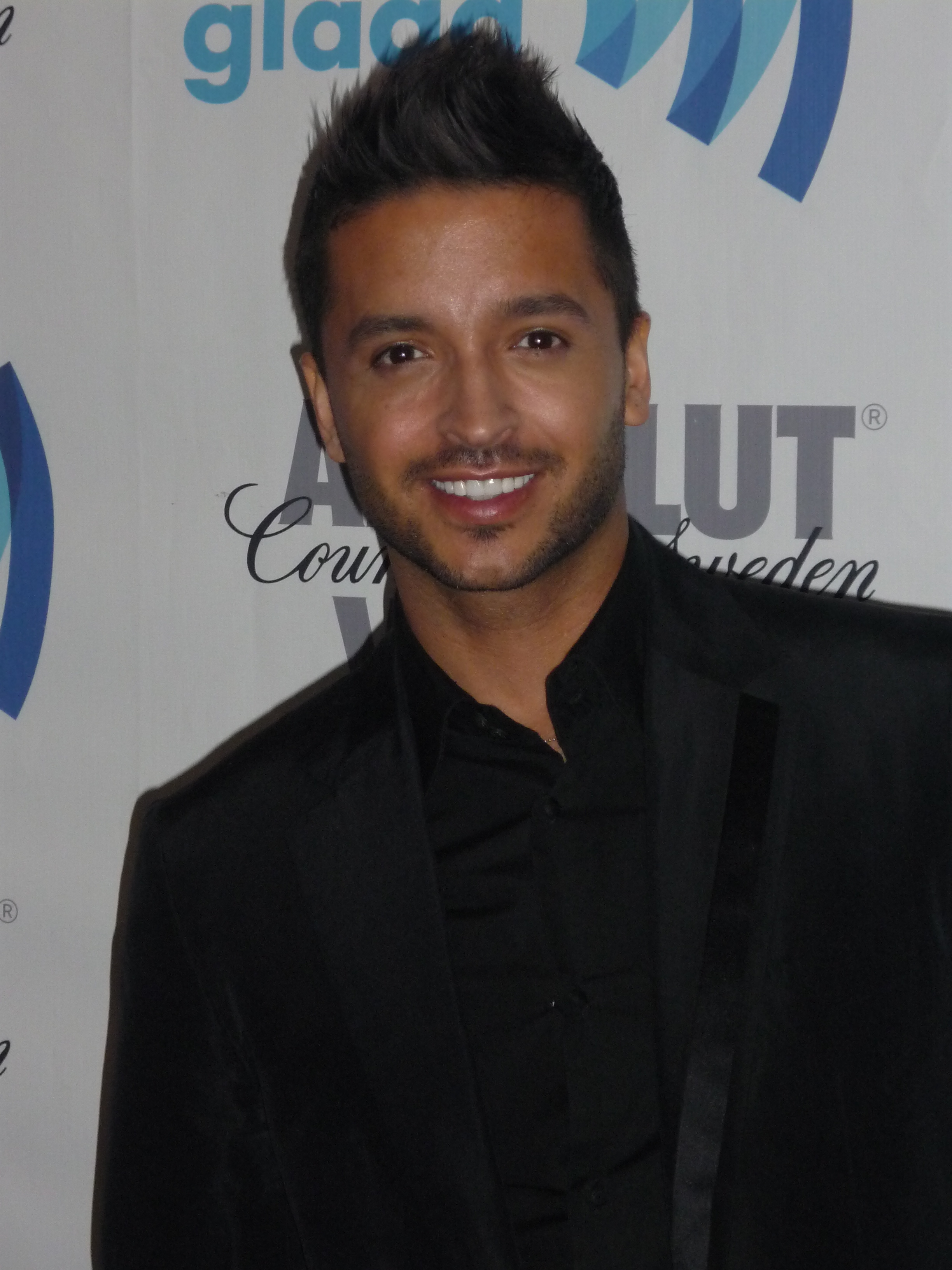 Jai Rodriguez 2010